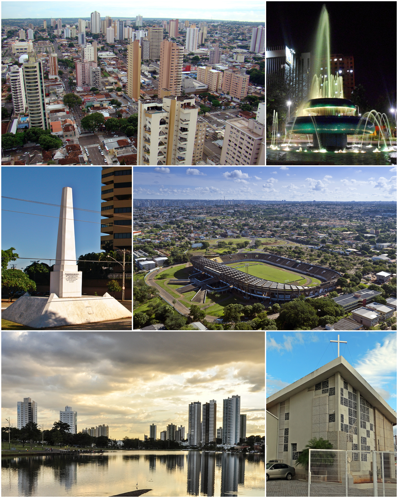 Montagem de Campo Grande, Mato Grosso do Sul, Brasil.